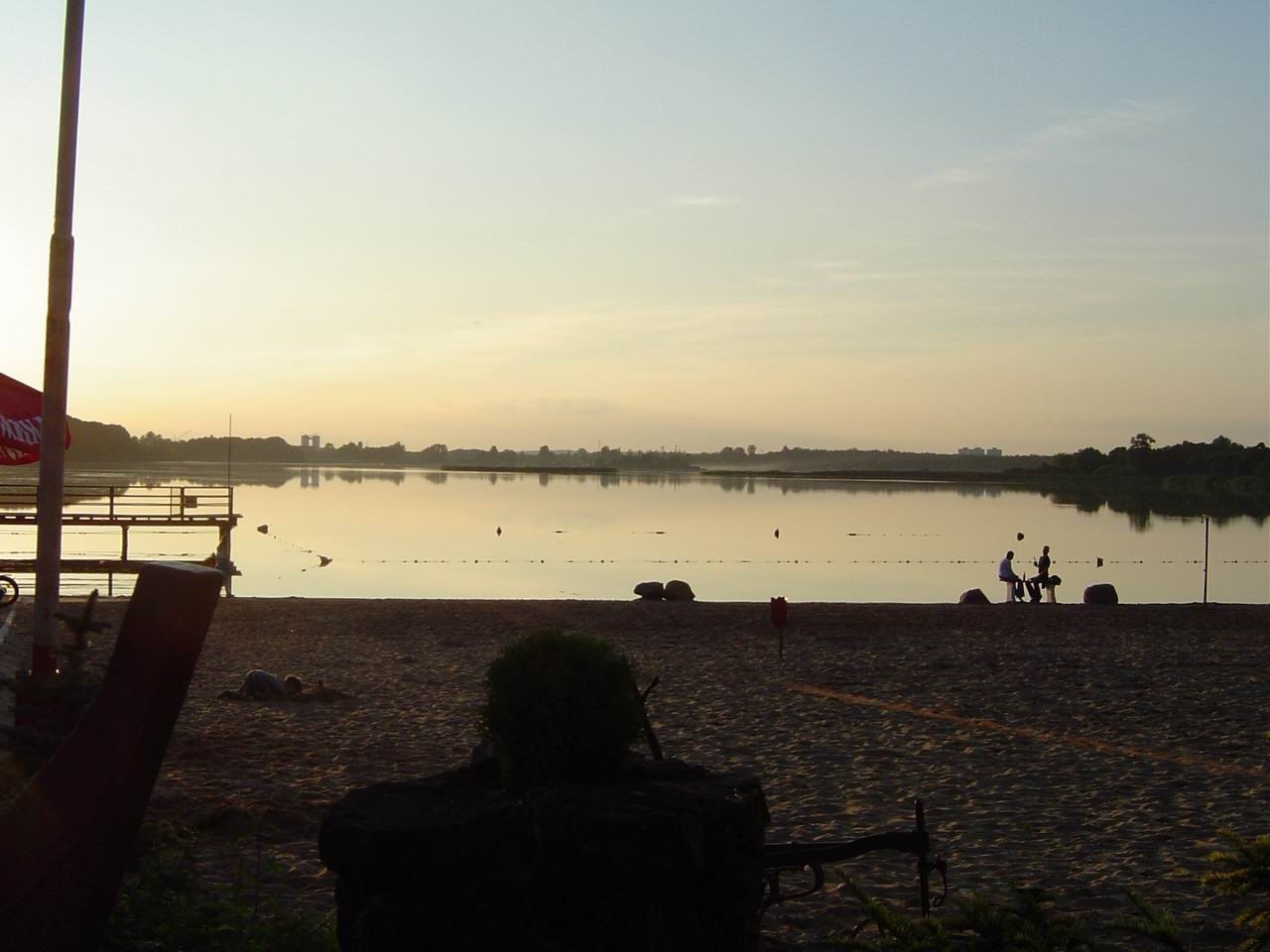 Jezioro Wielkie Rudnickie w Grudziądzu